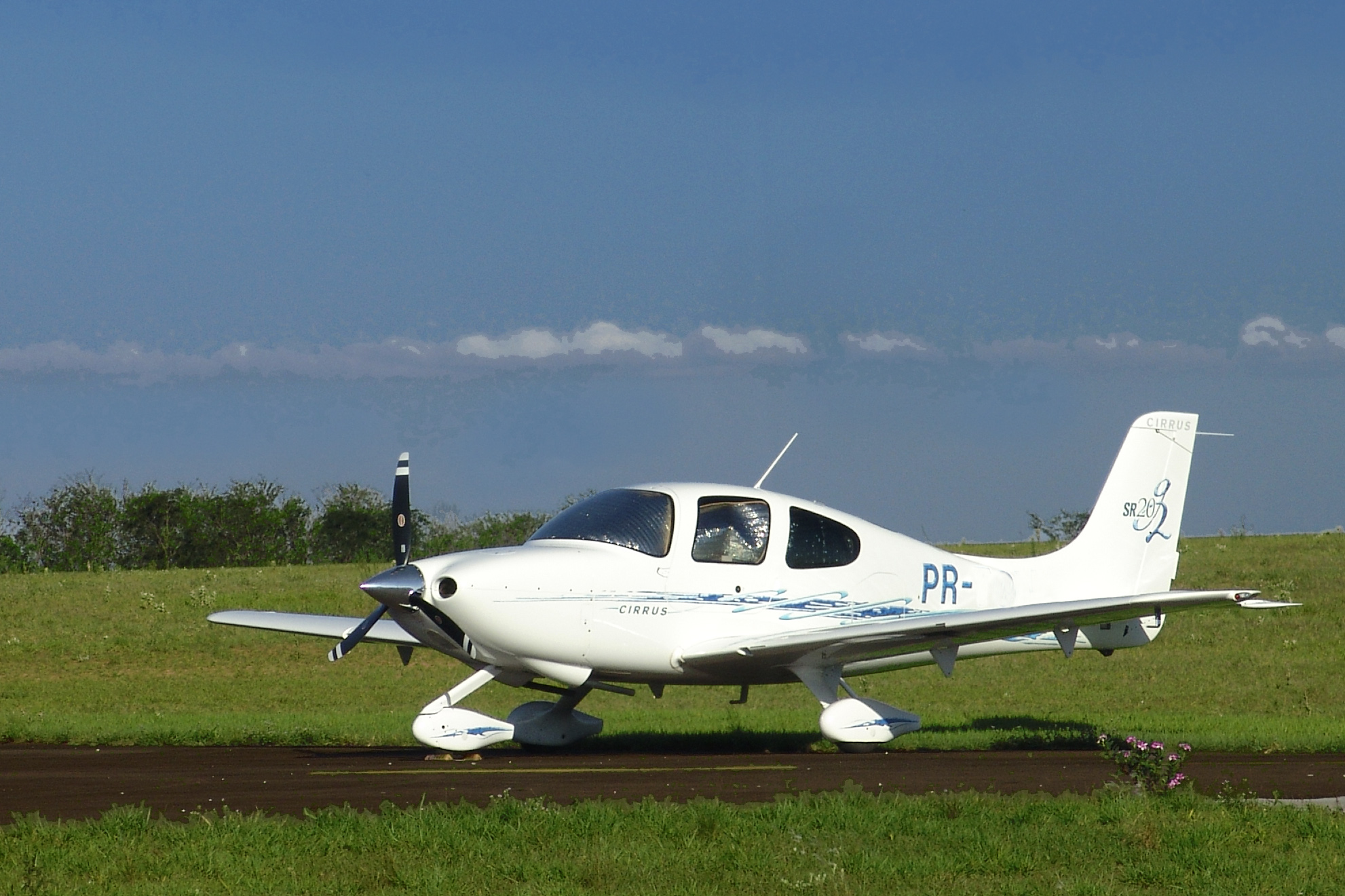 Cirrus SR20, no Aeroporto de Avaré, São Paulo, Brasil